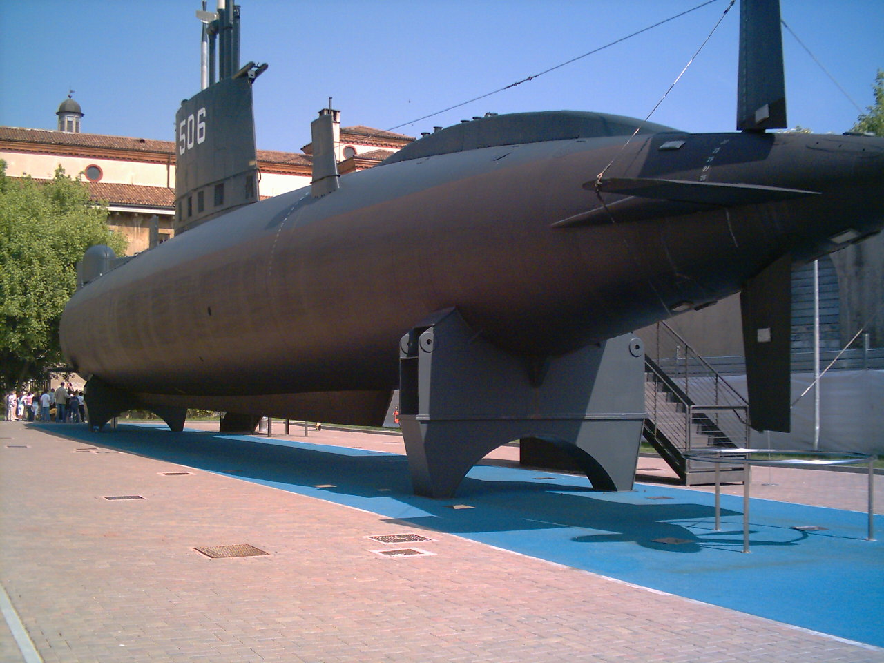 Il sommergibile Enrico Toti esposto al Museo della Scienza e della Tecnica di Milano.